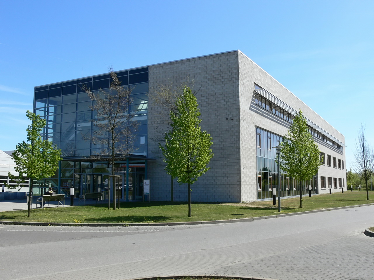 Fachhochschule Stralsund - Haus 21 - Fachbereich Wirtschaft (School of Business Studies)